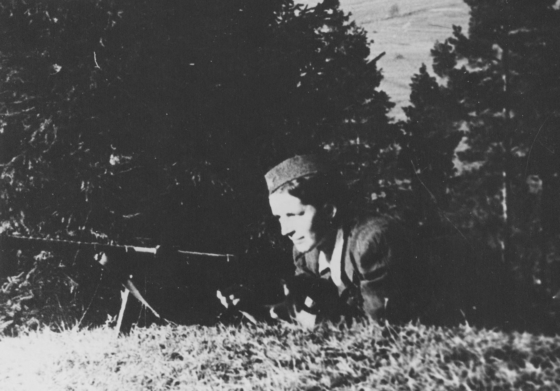 Majda Šilc, narodni heroj, na položaju kod Ribnice, Slovenija. Poginula 14. jula 1944. kod Novog Mesta.